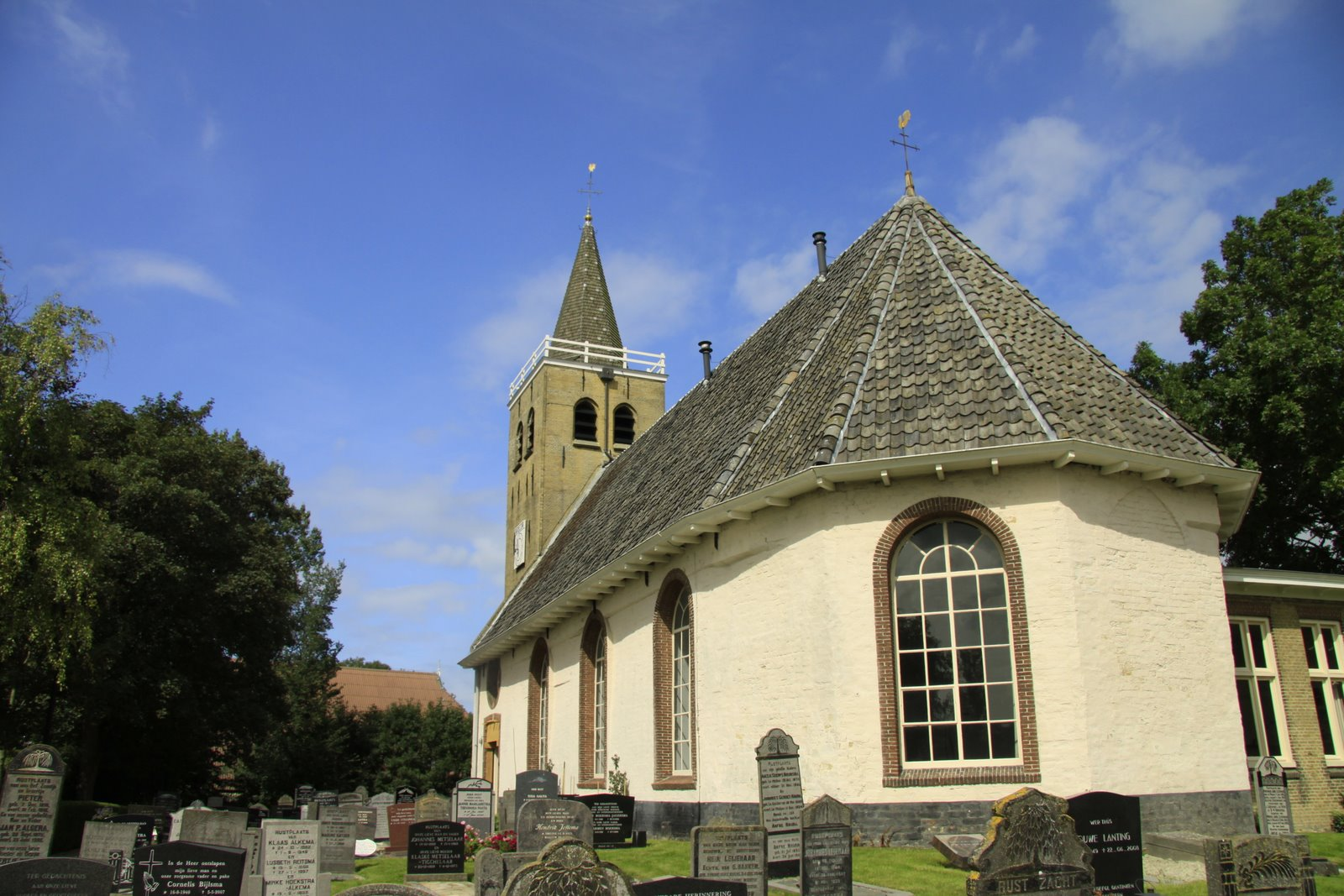 De Hervormde kerk van Midlum Gemeente Harlingen Friesland. De kerk is uit ca. 1200 hij staat op een terp restant